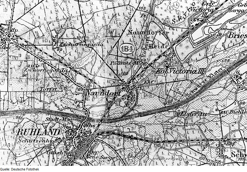 Original image description from the Deutsche Fotothek Ruhland-Naundorf. Pößnitzmühle, Ausschnitt aus: Reichskarte, 1:100.000, Einheitsblatt Nr. 89, 1922